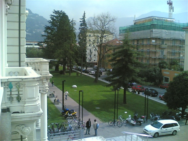 Università della Svizzera Italiana (Lugano, Switzerland) from the main building